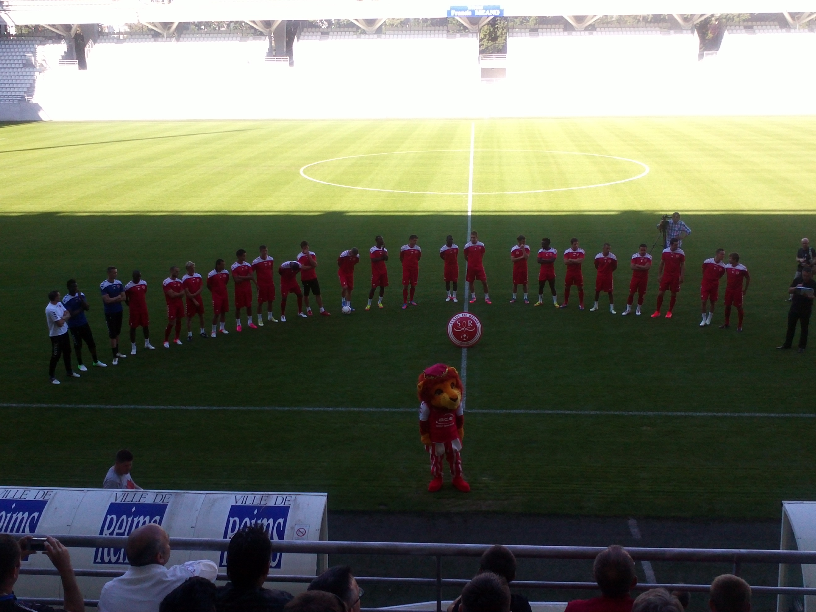 Présentation de l'effectif du Stade de Reims lors de la journée des abonnés.